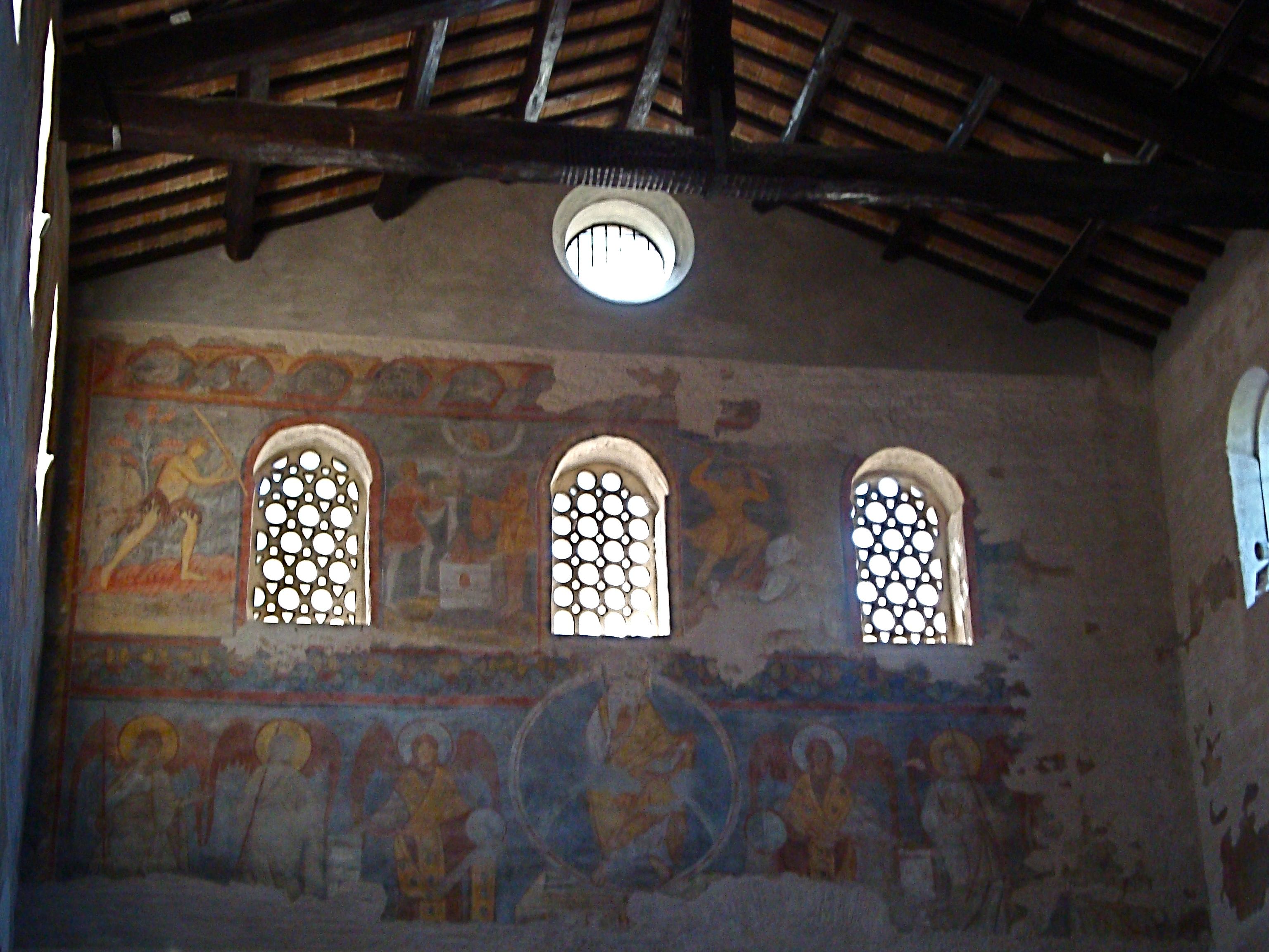 Mur du Narthex de l'Église San Giovanni a Porta Latina de Rome